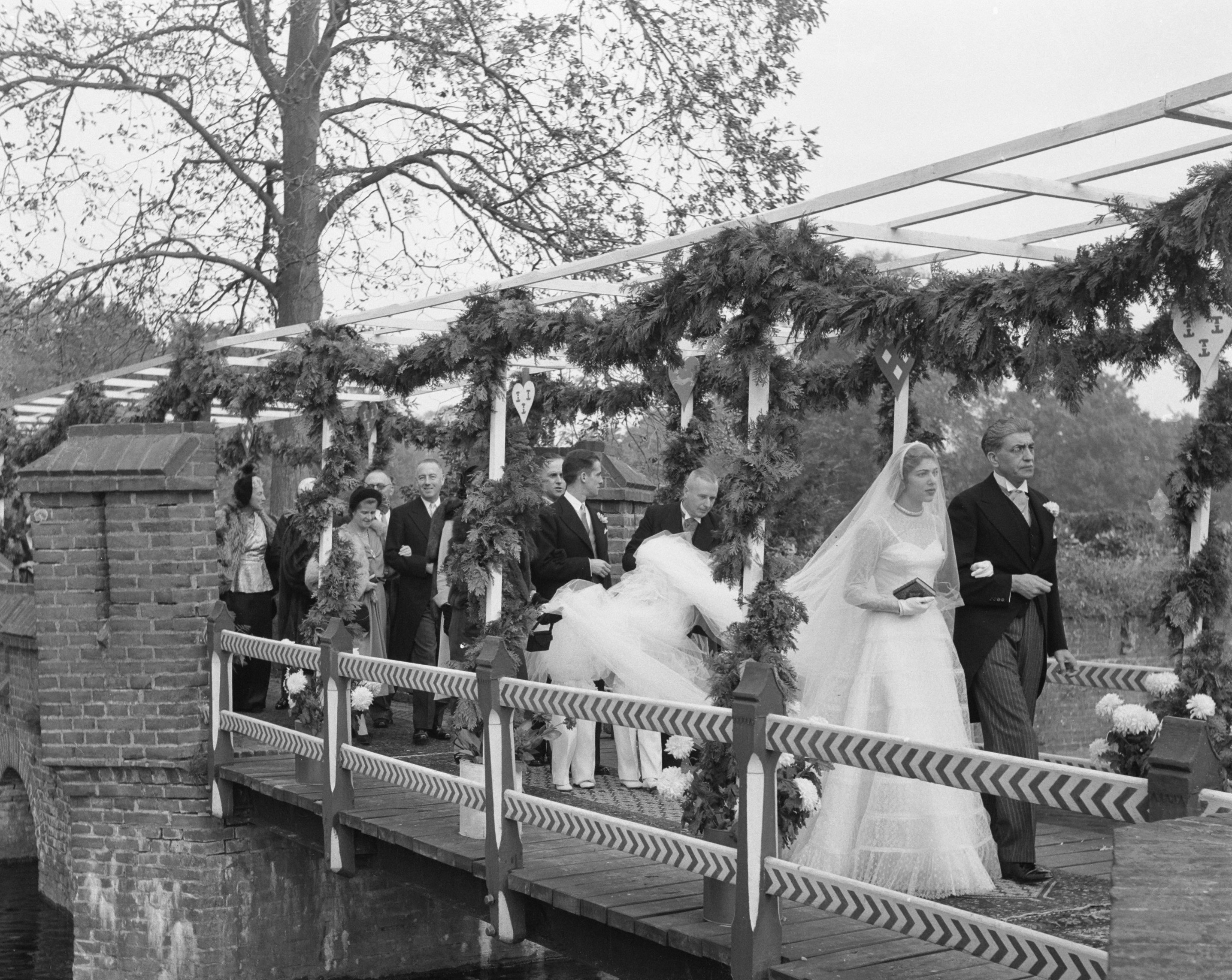 Collectie / Archief : Fotocollectie Anefo Reportage / Serie : [ onbekend ] Beschrijving : Huwelijk te Haarzuilens Graaf Van Nicolay met Barones van Zuilen van Nijevelt van der Haan Datum : 11 oktober 1950 Locatie : Haarzuilens Trefwoorden : huwelijken Persoonsnaam : Barones van Zuilen van Nijevelt van der Haan Fotograaf : Noske, J.D. / Anefo Auteursrechthebbende : Nationaal Archief Materiaalsoort : Negatief (zwart/wit) Nummer archiefinventaris : bekijk toegang 2.24.01.03 Bestanddeelnummer : 904-2407 Reacties Geplaatst door Maaike op 01 oktober 2013 - 16:37. Huwelijk te Haarzuilens. Graaf François de Nicolay en barones Marie-Hélène Naila Stéphanie Josina barones van Zuylen van Nyevelt van de Haar Persoonsnamen: barones M.H.N.S.J. van Zuylen van Nyevelt van de Haar, graaf François de Nicolay Geplaatst door Maaike op 01 oktober 2013 - 16:43. NB. Op deze foto is de bruid met haar vader baron van Zuylen van Nyevelt van de Haar te zien. Persoonsnamen: Egmont van Zuylen van Nyevelt